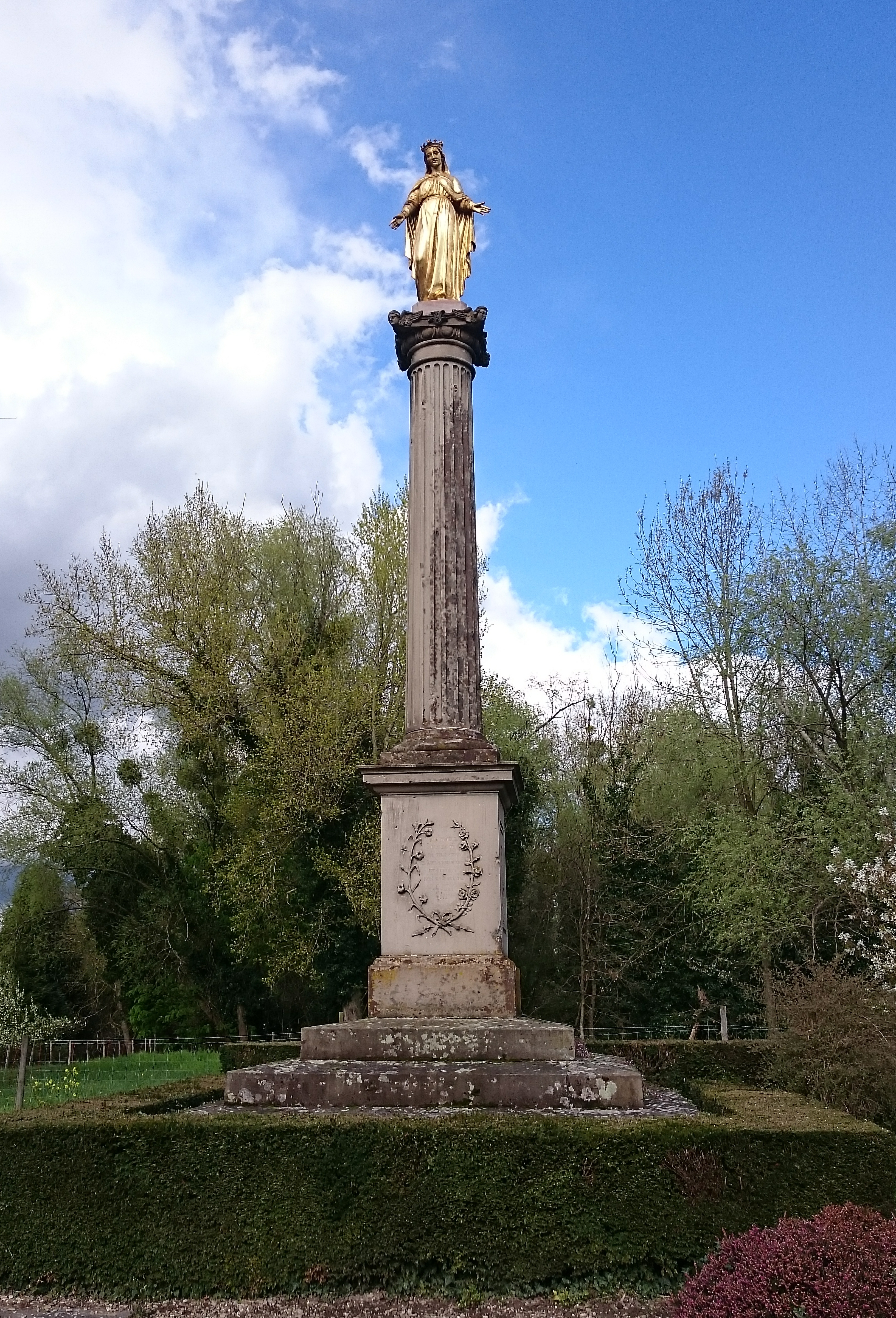 Vierge du Rhin à Rhinau